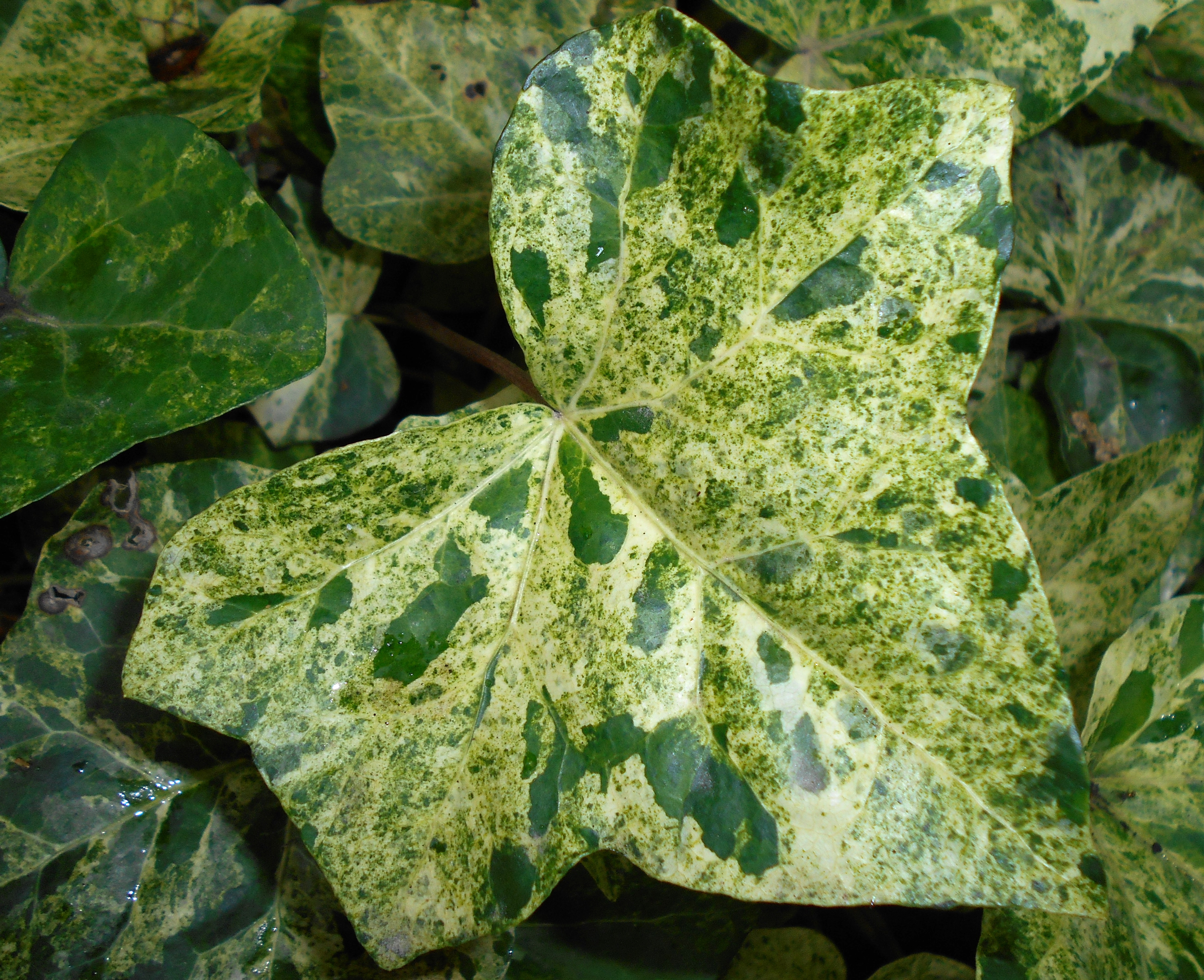 Bluszcz pospolity ‘Profesor Seneta’ (Hedera helix ‘Profesor Seneta’), Ogród Botaniczny UMCS w Lublinie.